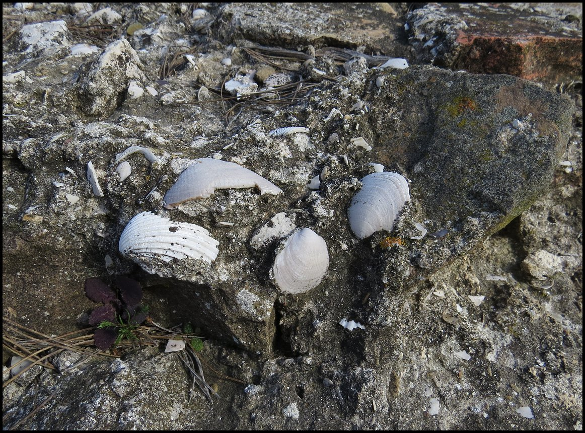 Coquillages (Cardium, Tapes) inclus dans du mortier, mur sud-ouest, villa gallo-romaine de Fount de Rome, Fleury d'Aude, Aude, Occitanie